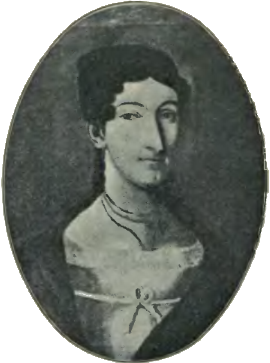 Maria Christina Sophia Ehrnström, gift med teaterdirektør Johan Peter Strömberg